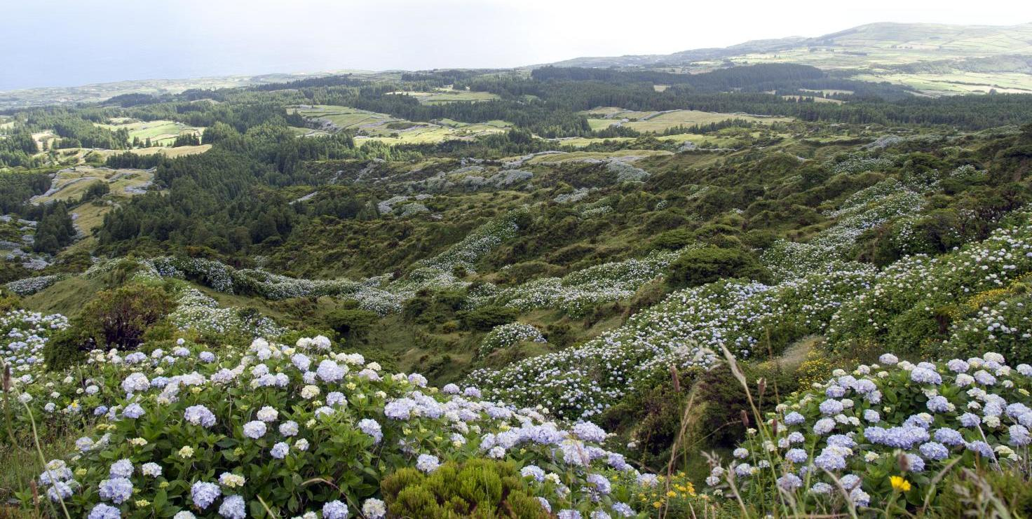 Faial